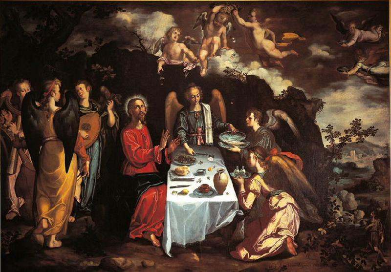 Cristo servido por los ángeles, óleo sobre lienzo, 268 x 418 cm. Castres, musée Goya.